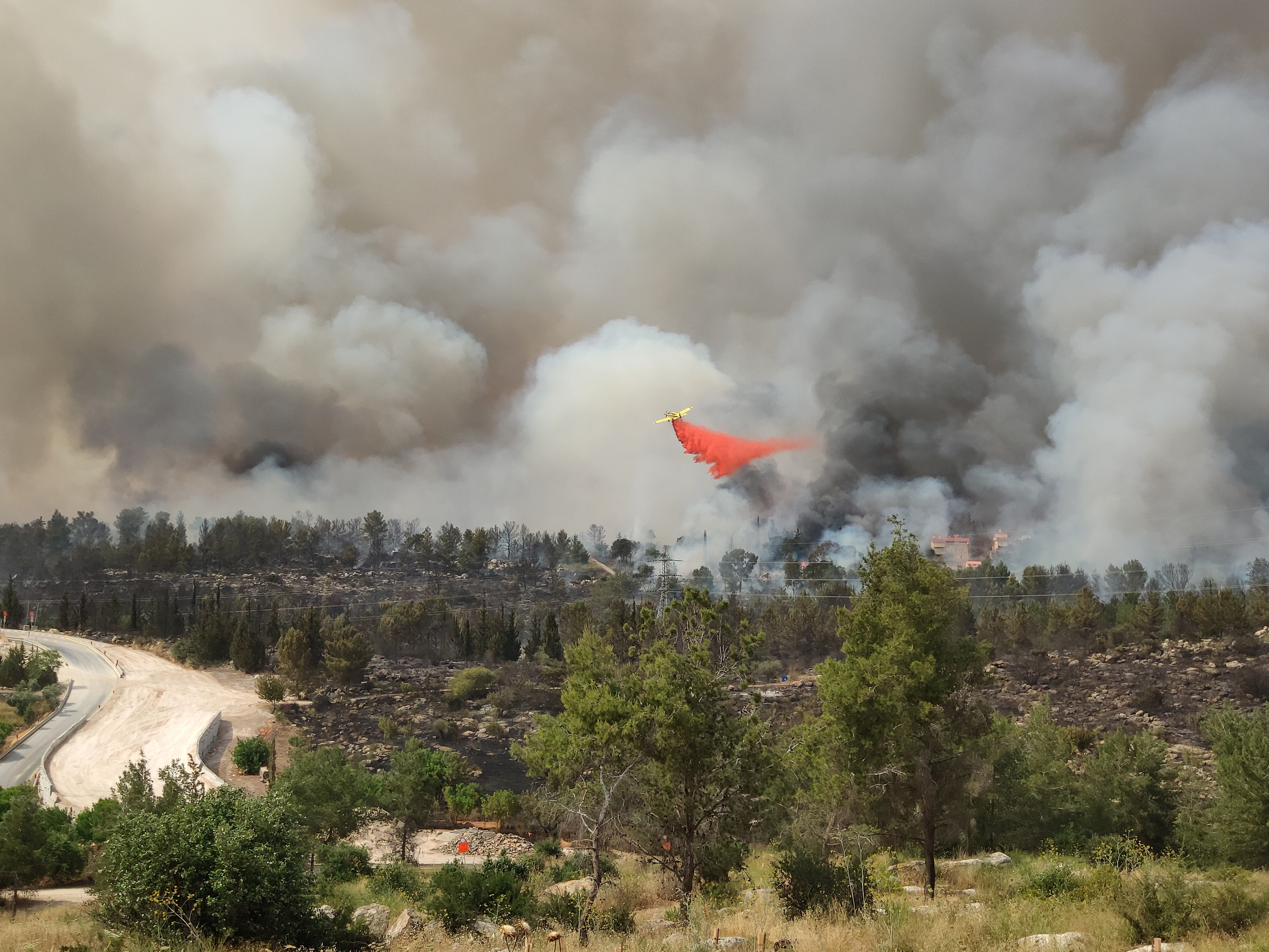 מטוס כיבוי בפעולה בשריפה באזור מבוא מודיעים, 23 במאי 2019. צולם מאזור התעשייה של מודיעין